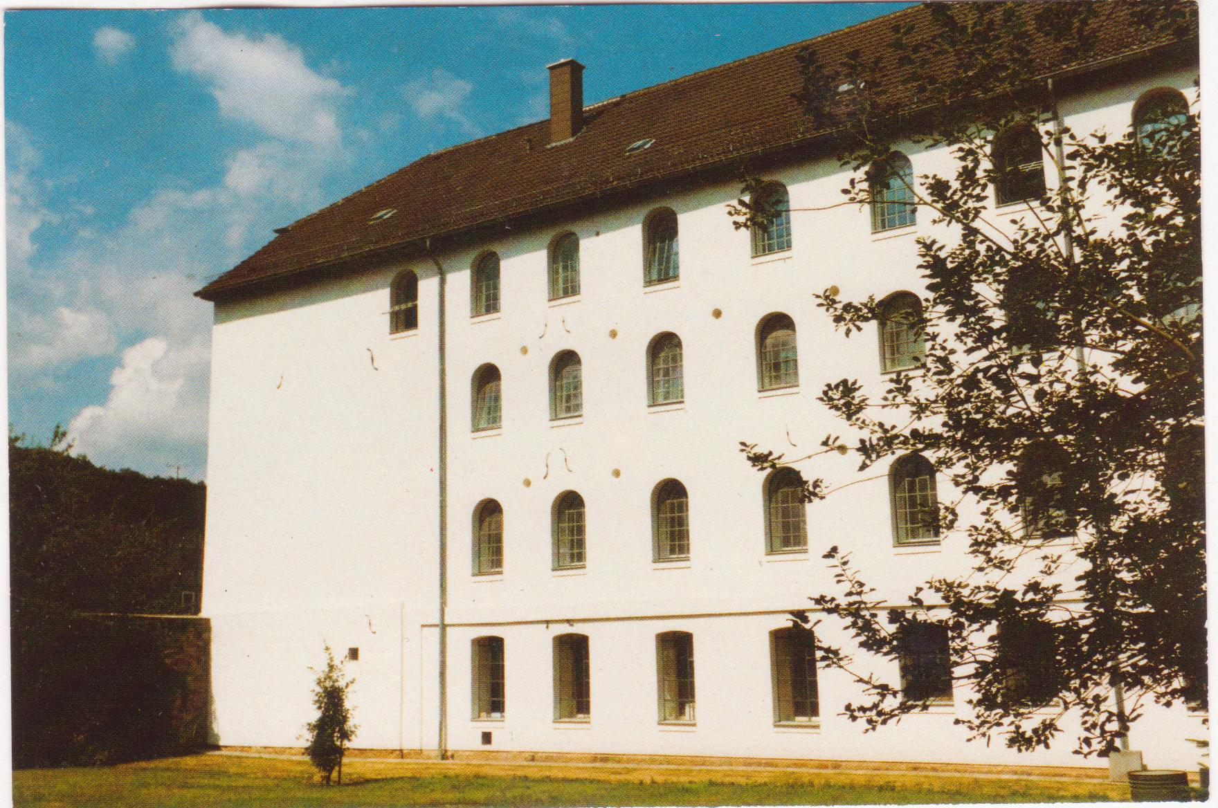 Deutsches Hugenotten - Museum in Bad Karlshafen